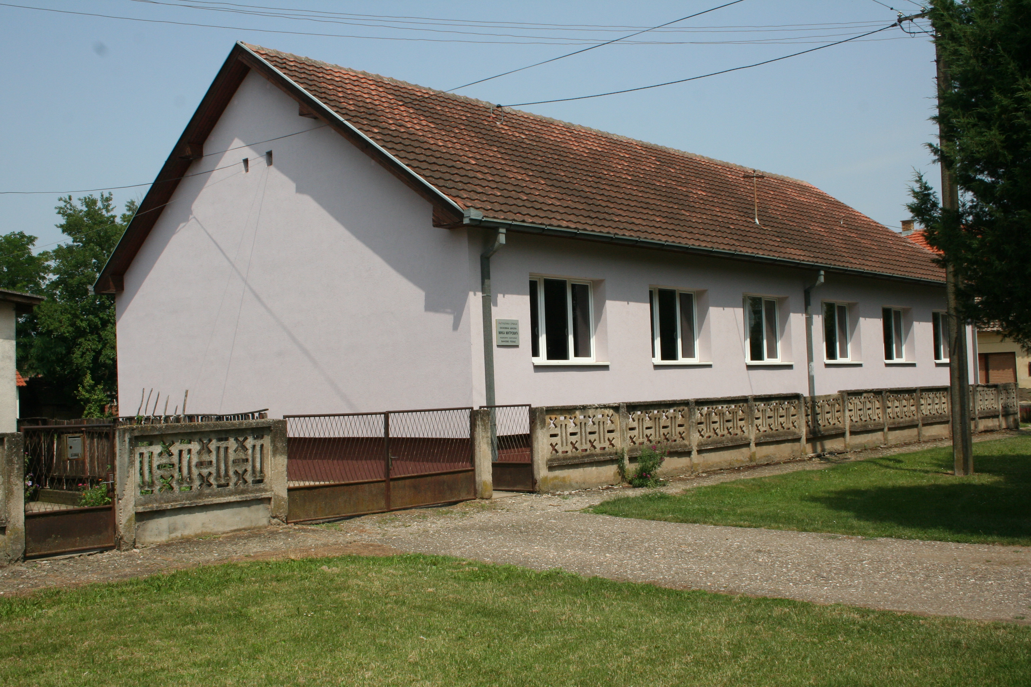 Zgrada seoske škole, Banovo Polje